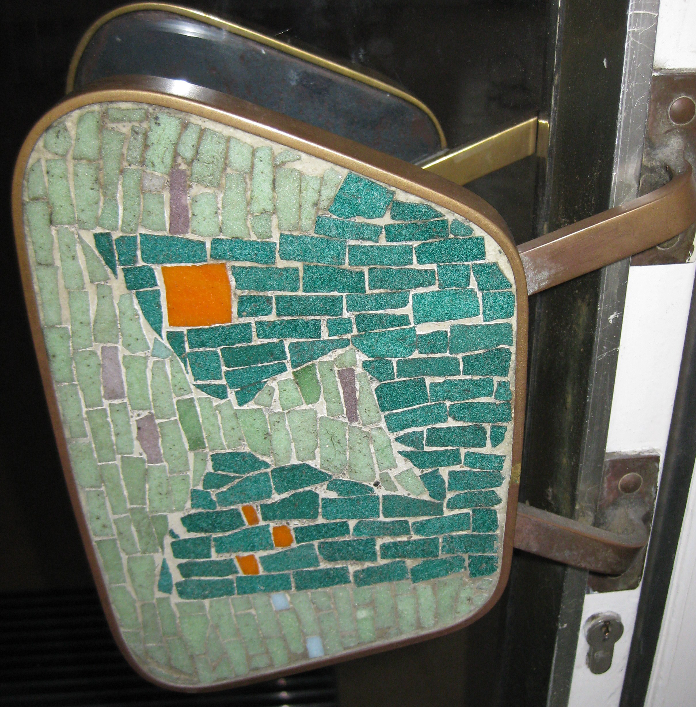 Mosaiktürdrücker der 1950er Jahre an Ladengeschäft im Lübecker Rathaushof von Peter Thienhaus.